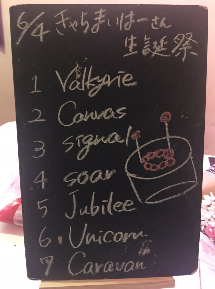 amiinAセトリボード